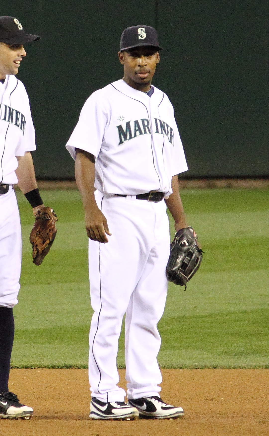 Chone Figgins